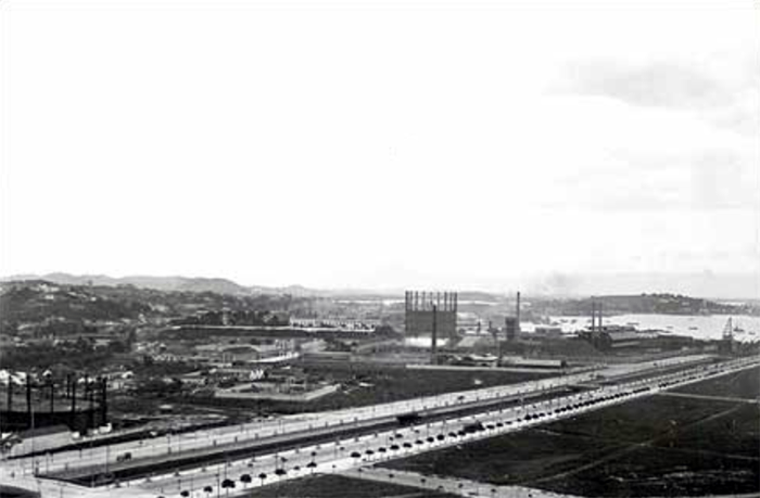 Avenida Francisco Bicalho e em segundo plano o Gasômetro de São Cristóvão, Rio de Janeiro, Brasil.